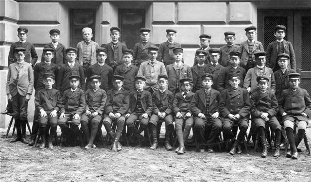 "klasskort, taget av lektor Moll, jag tror att det är klass 5a" (Norra Real) översta raden: Janzén / Swederus / Wulferma / von Hofsten / okänd / Bolin / Nordenswan / Odelberg / Okänd / Carell? / Midtersta raden: Cedergren / James af Donner / Taflin? / Blomqvist / Norman / Bernhard ?? / Louis Lettersten / Tektonius / Bökman / Stellan Mörner / P:s Percy / okänd / Envall? / Nedersta raden: Yngve Larsson (borgarrådet) / Rääf av Småland / Odén / Holmberg / Ekwall / Berg?? / Lundberg / Åkerqvist / Drakenberg / Gösta Larsson / Heyman /